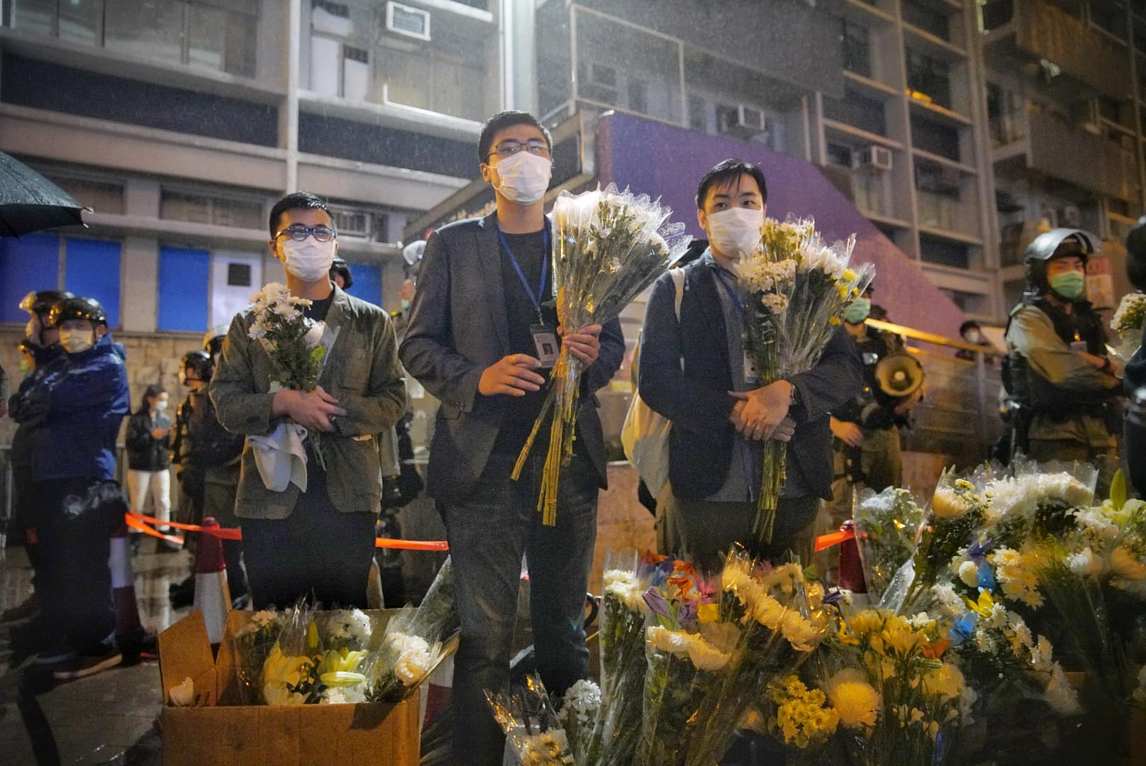 2020年3月31日為太子站襲擊事件7個月